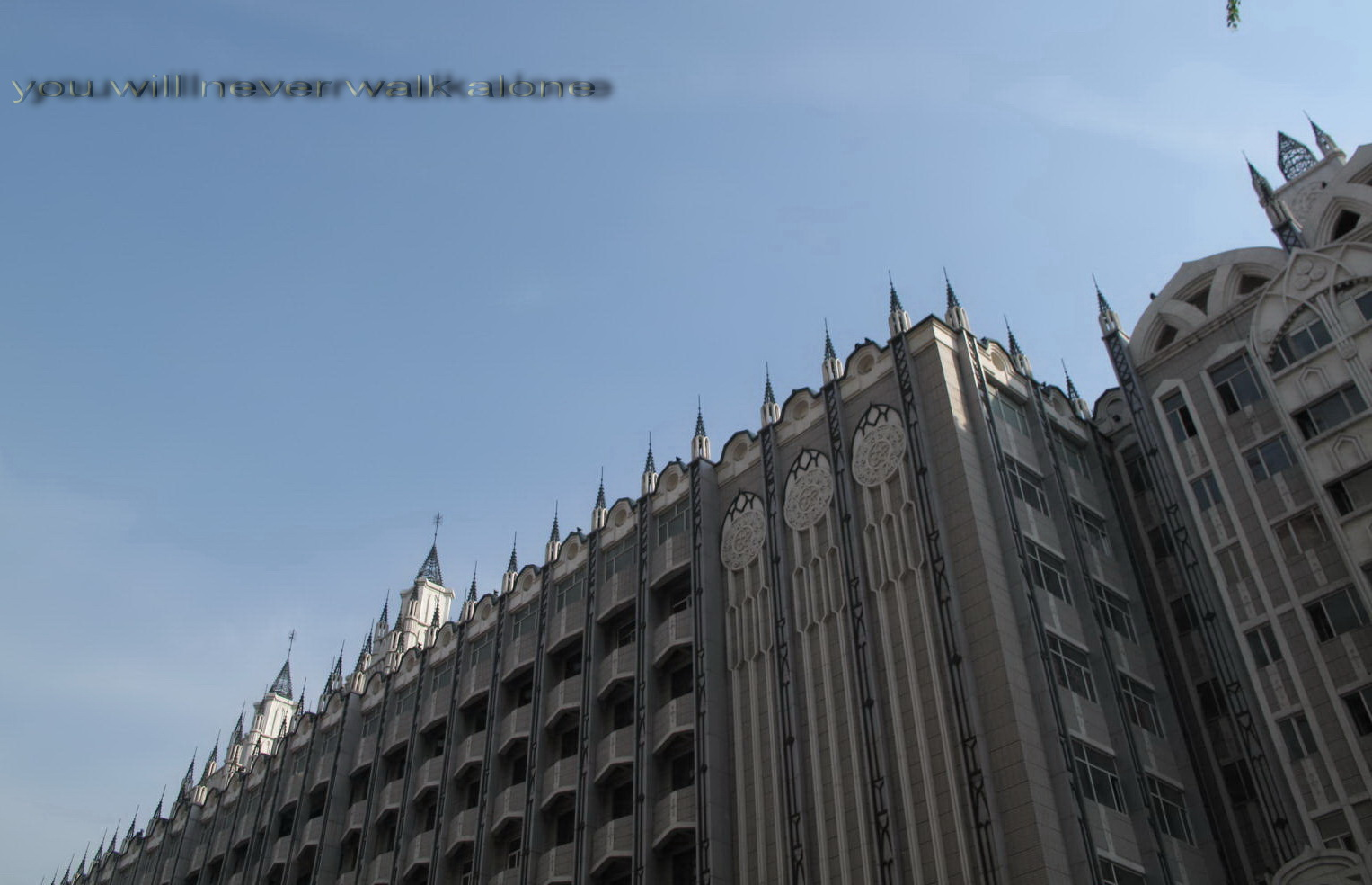 中文（中国大陆）: 果戈理大街的西式建筑